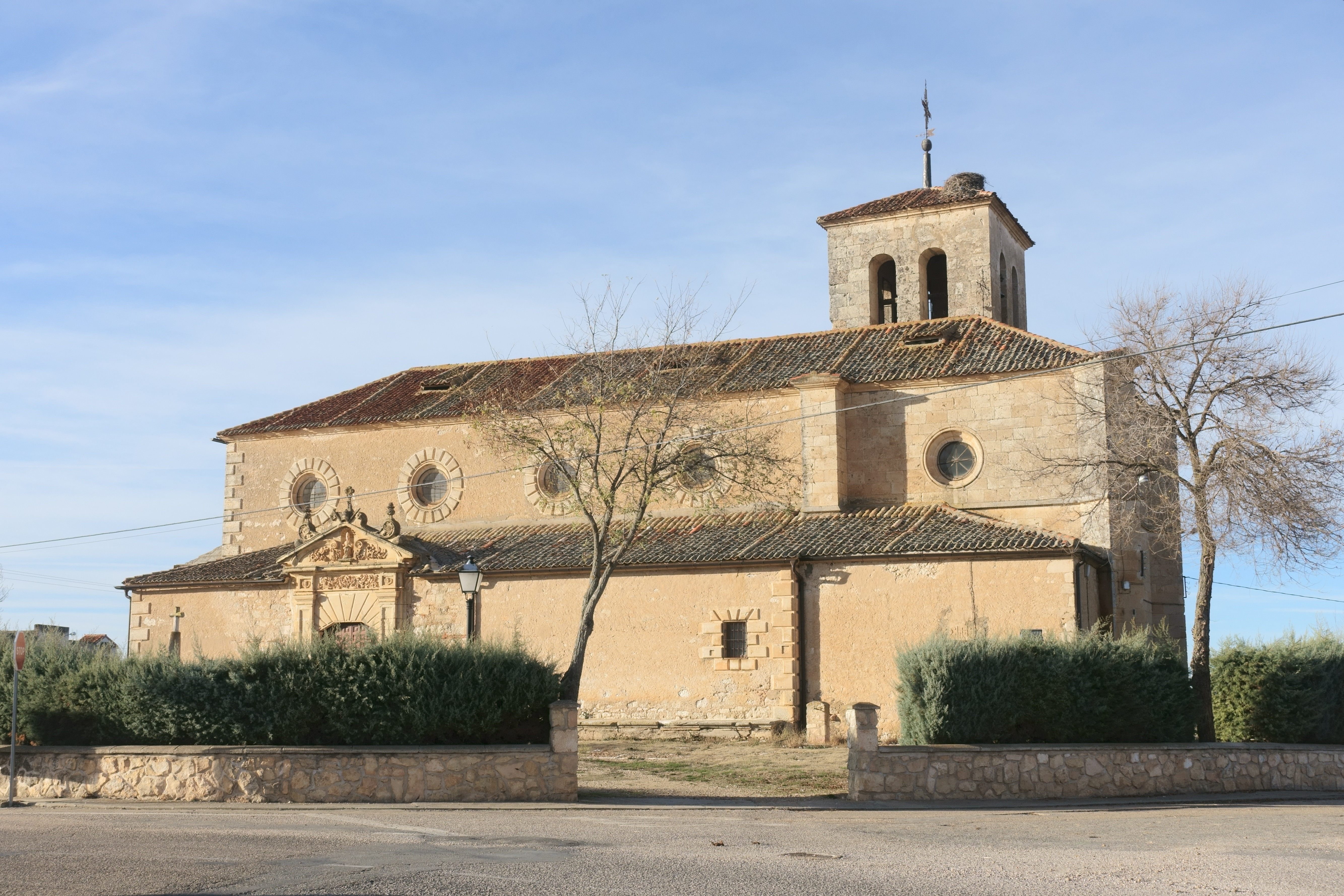 Iglesia de San Pedro Ad Víncula, Campo de San Pedro (Segovia, España).